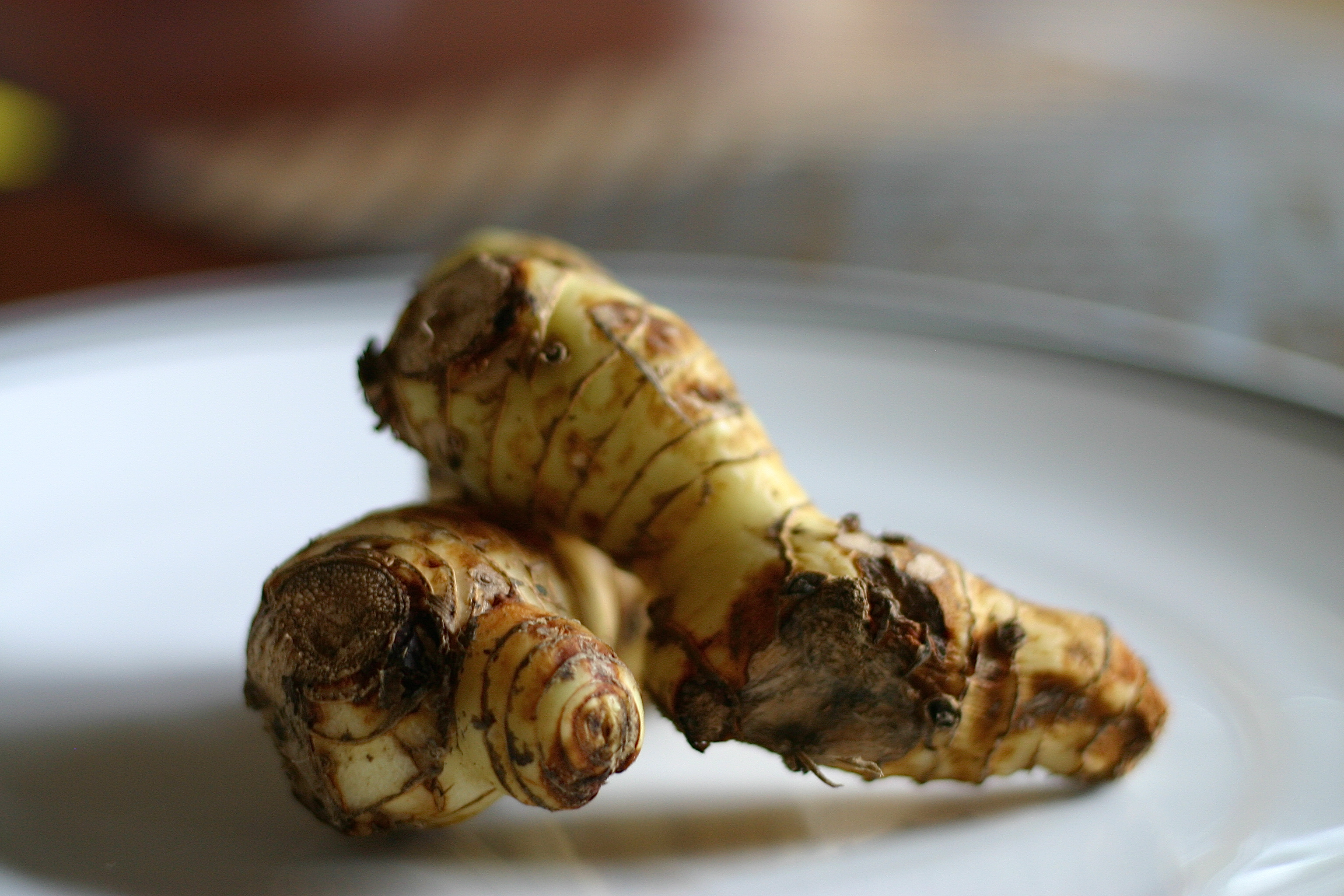 Thai Ingwer aka Galangal